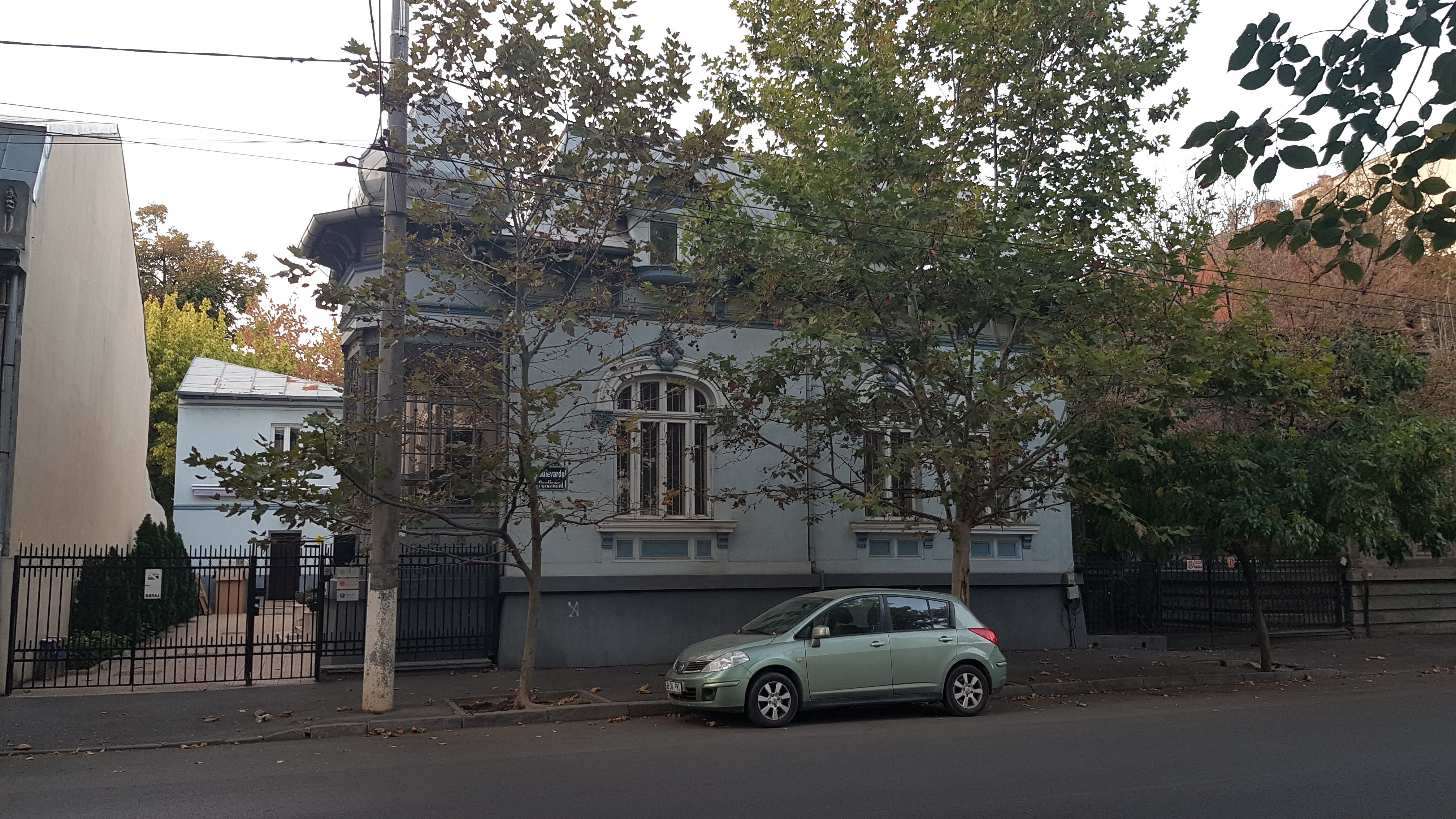 Casa Maria Budișteanu